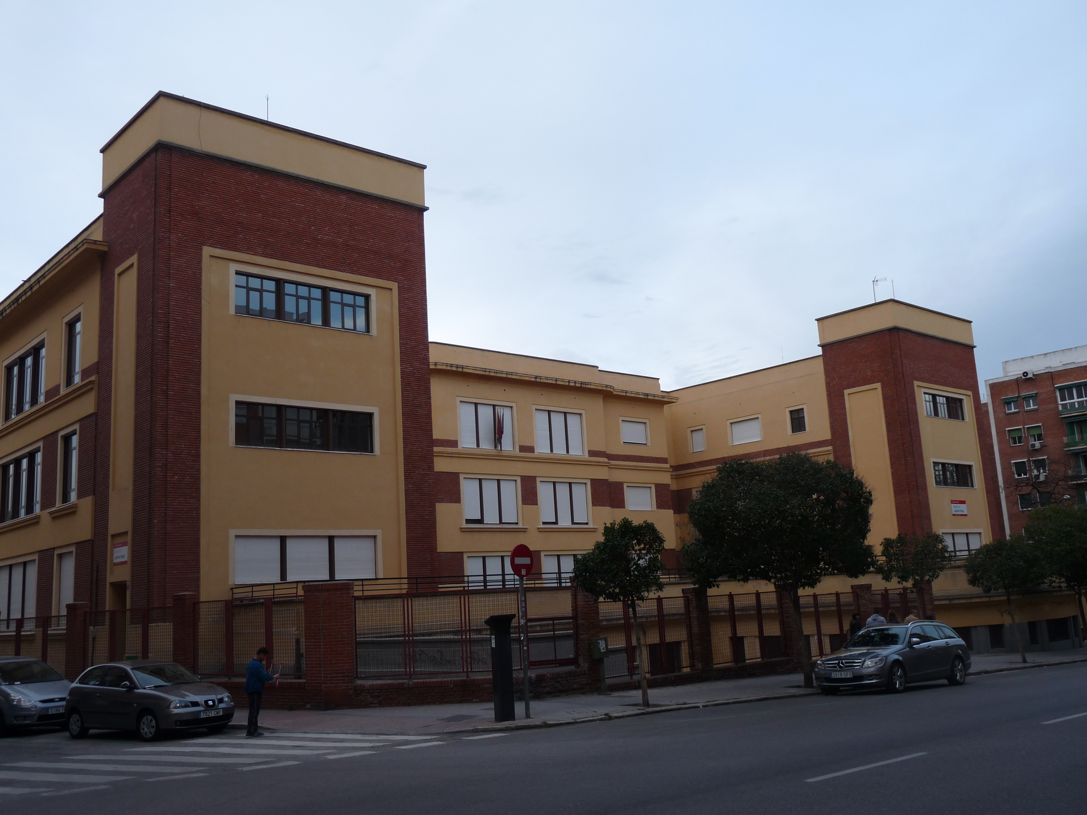 Instituto de Educación Secundaria Jaime Vera, calle del General Yagüe, Madrid, España. Arquitecto: Bernardo Giner de los Ríos. Años 30. Online database: COAM